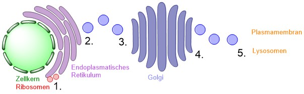 Secretory pathway: ER, Golgi, Vesikel, Lysosomen, Plasmamembran